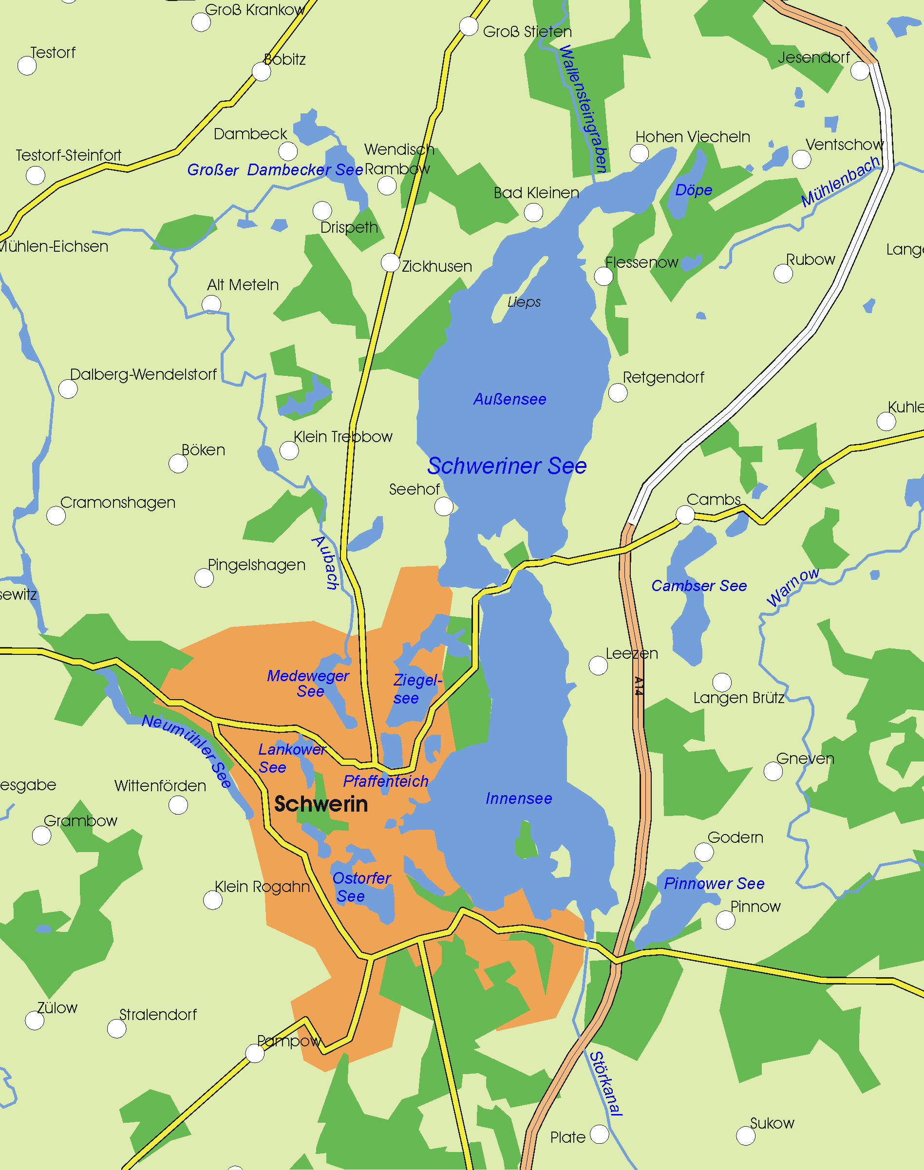 Schweriner See, Mecklenburg-Vorpommern